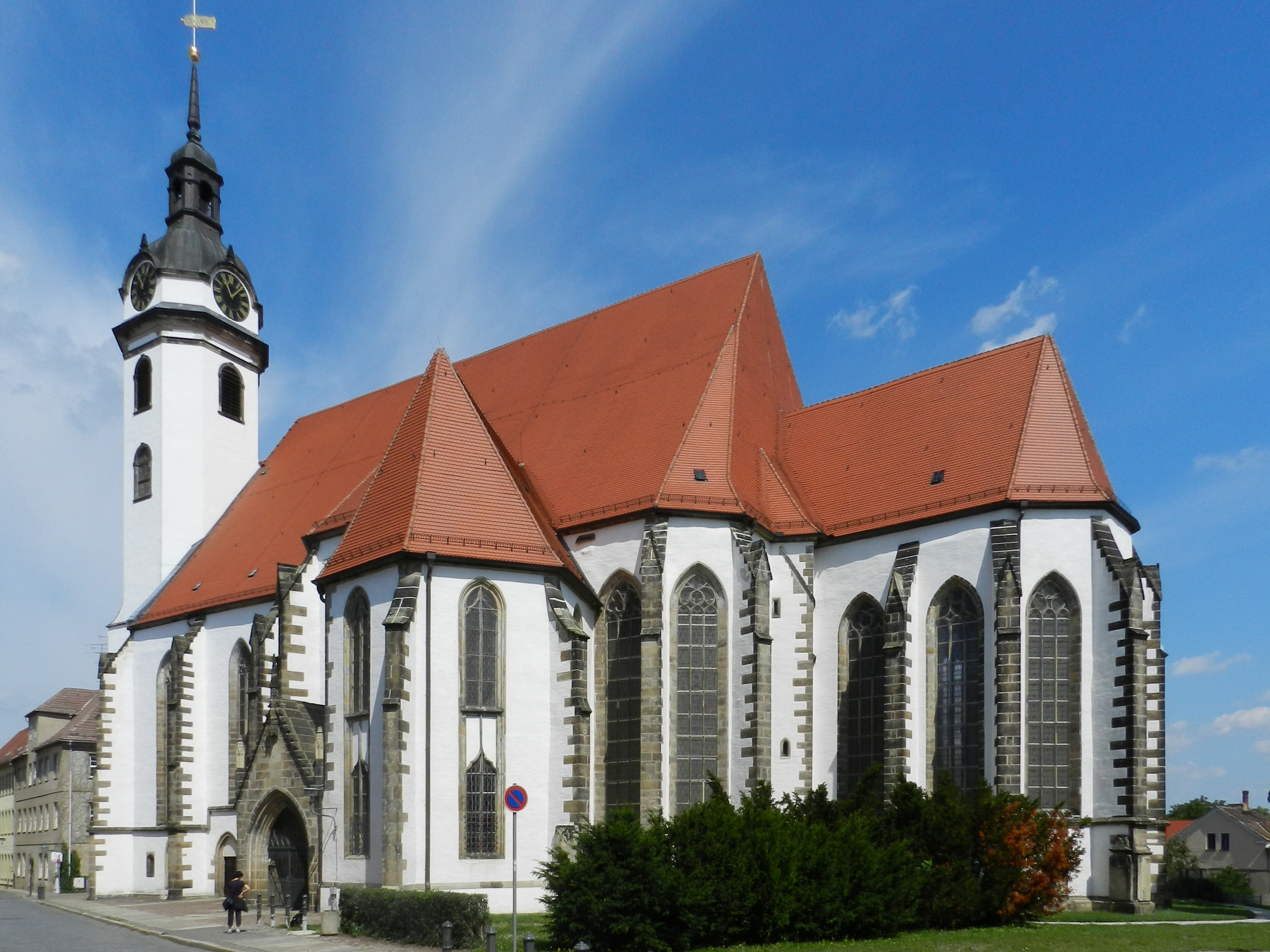 Torgau, Stadtkirche St. Marien (23. Juli 2011)